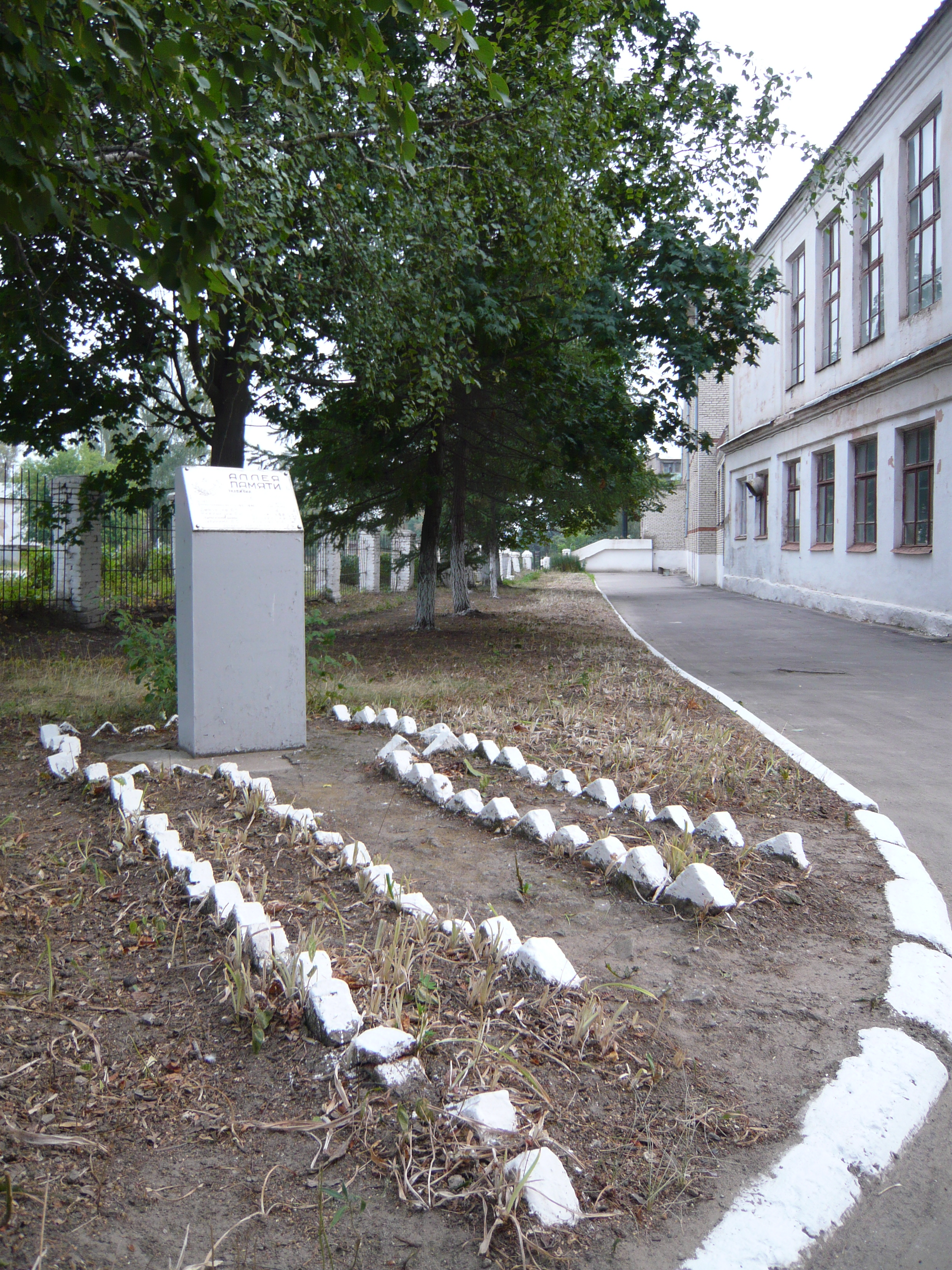 г. Ясногорск, Тульская обл. Аллея Памяти во дворе школы №2